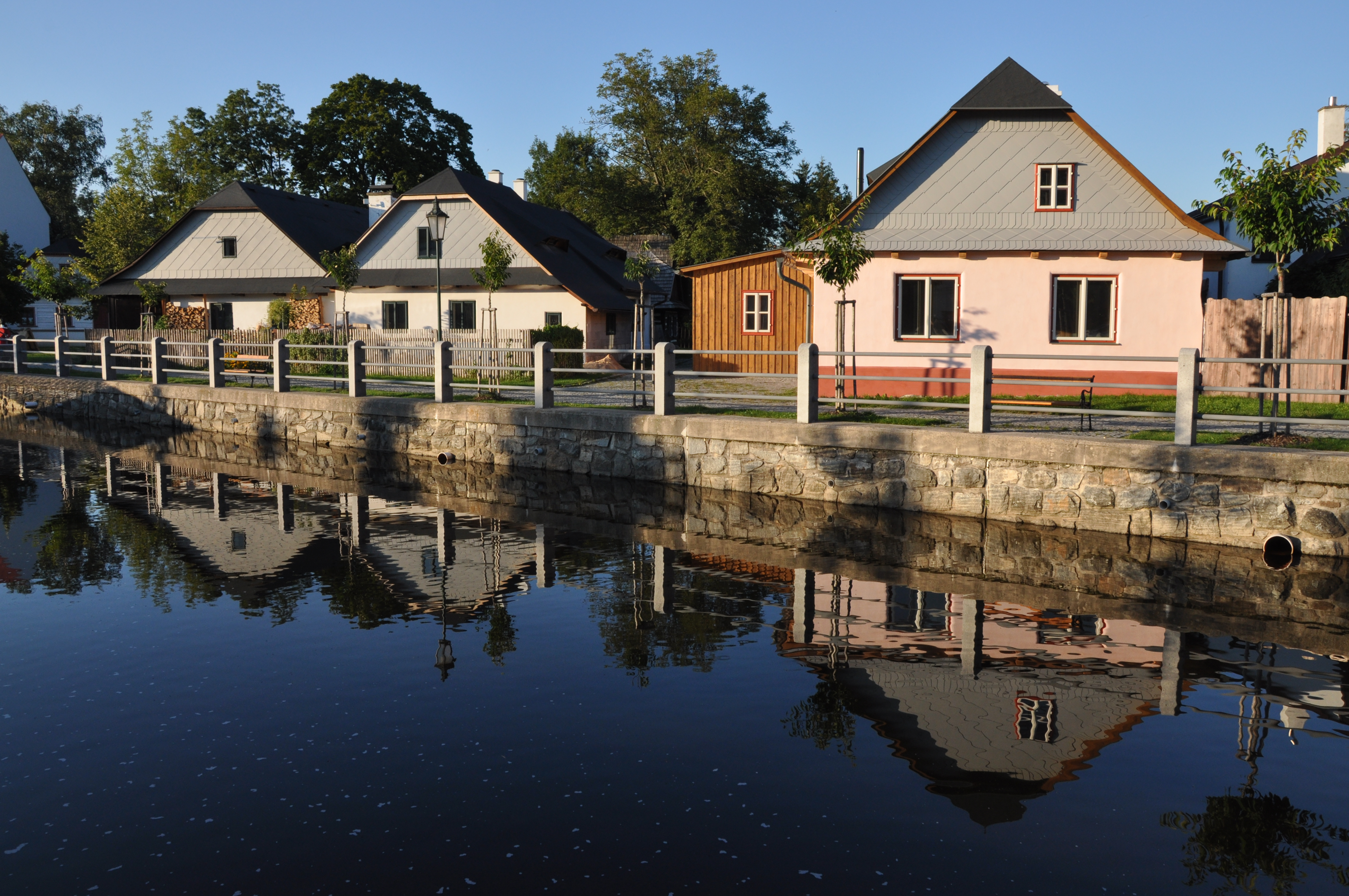 Hlinsko v Čechách